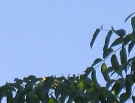 Image taken from my house in Buenos Aires at 5 PM (mid afternoon in summer) - Imagen tomada desde mi casa en Buenos Aires a las 5 PM (media tarde en verano) "es menira como puede ser un planeta visto asi nomas, ya lo sabriamos todos. No mientas" Eso de ahy arriba (lo he puesto entre comillas) lo he dejado para dejar ver a la gente hasta donde puede llegar la ignorancia en algunos seres humanos (que quiere decir necesariamente inteligentes...) Anda mirate Esto